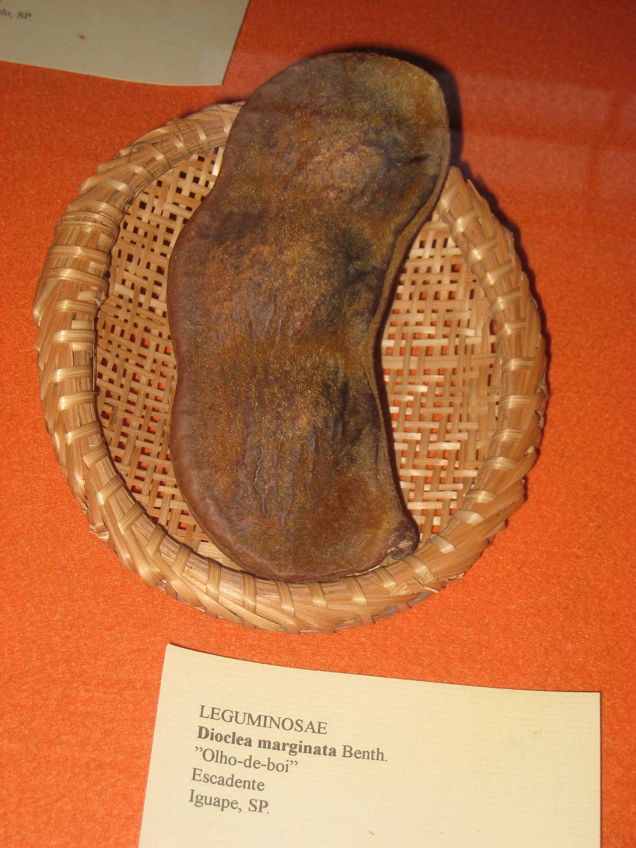 Dioclea marginata specimen in the Museu Botânico Dr. João Barbosa Rodrigues, Jardim Botânico de São Paulo, São Paulo City, SP, Brazil.